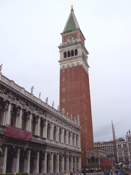 Venezia - Campanile di S. Marco